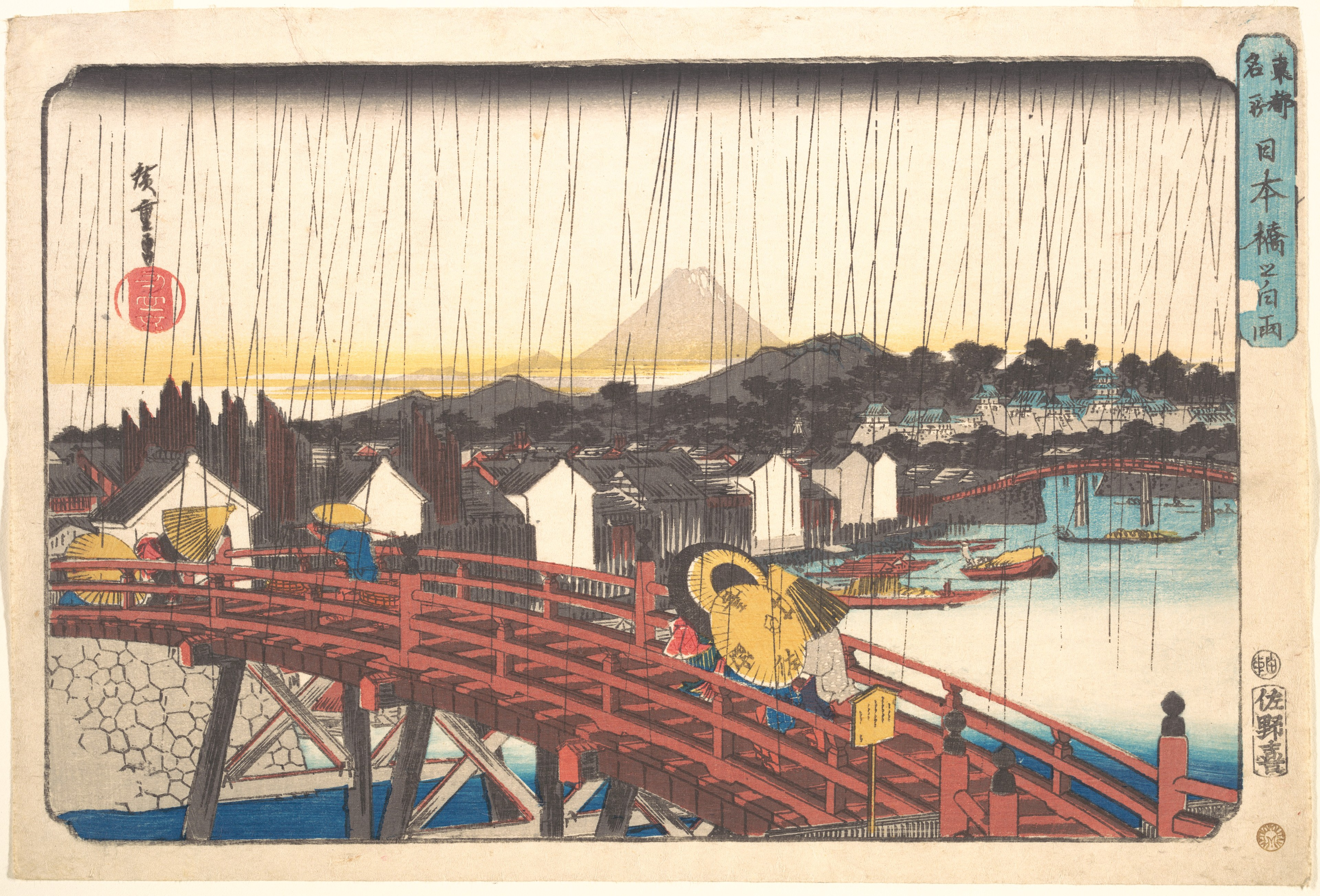 Japan; Print; Prints